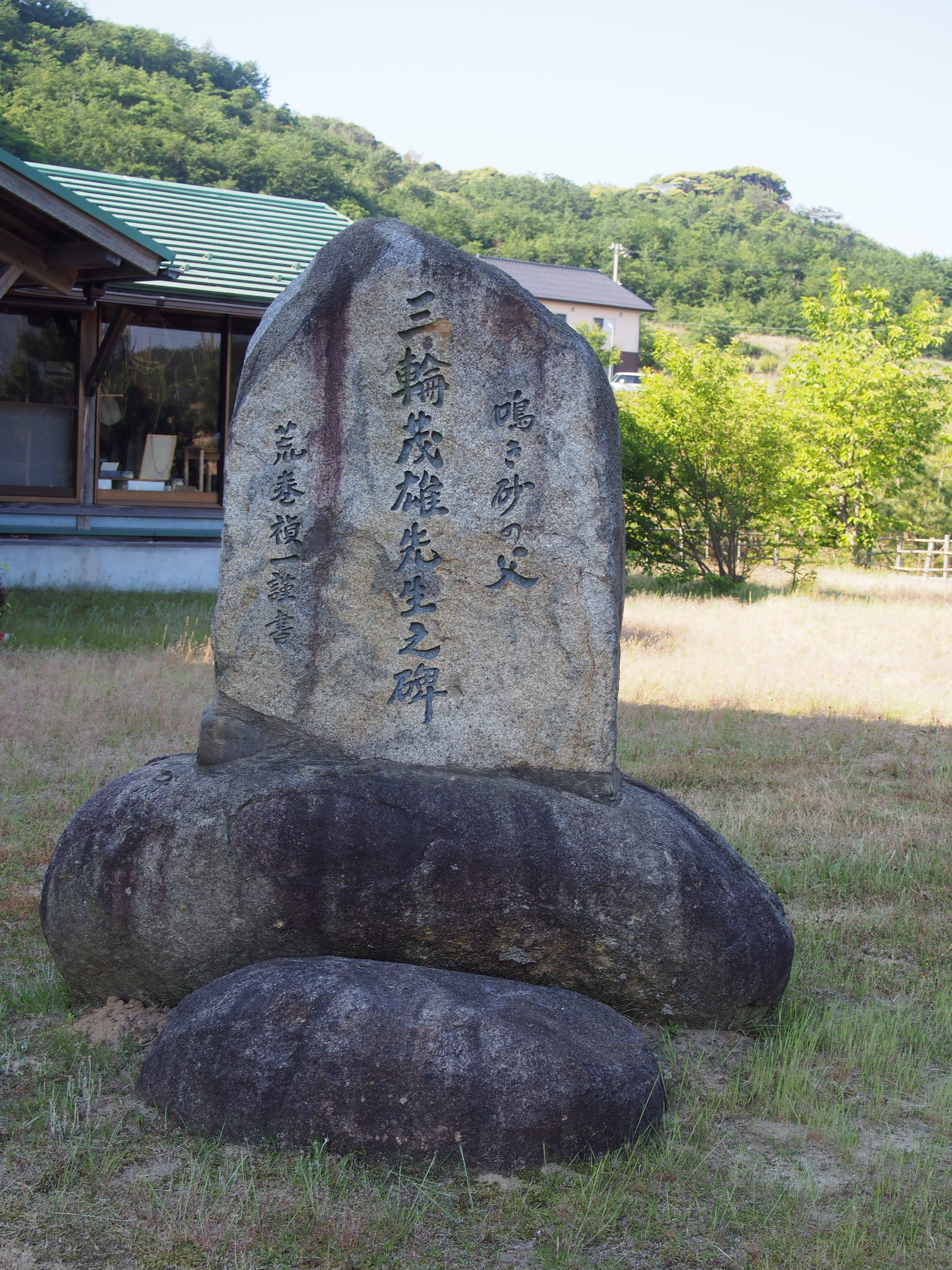 同志社大学名誉教授三輪茂雄先生の顕彰碑（表面）